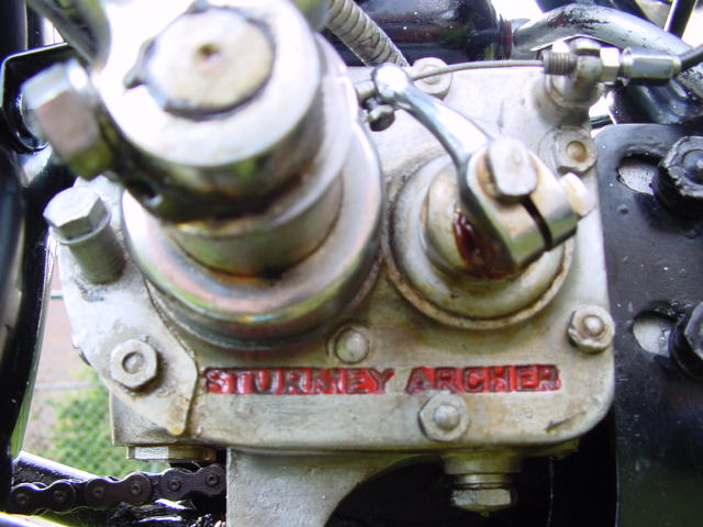 Raleigh 1932 onbekend.